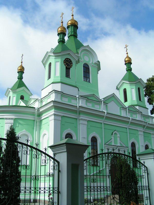 Беларуская (тарашкевіца): Сьвята-Сімяонаўскі сабор. г. Берасьце